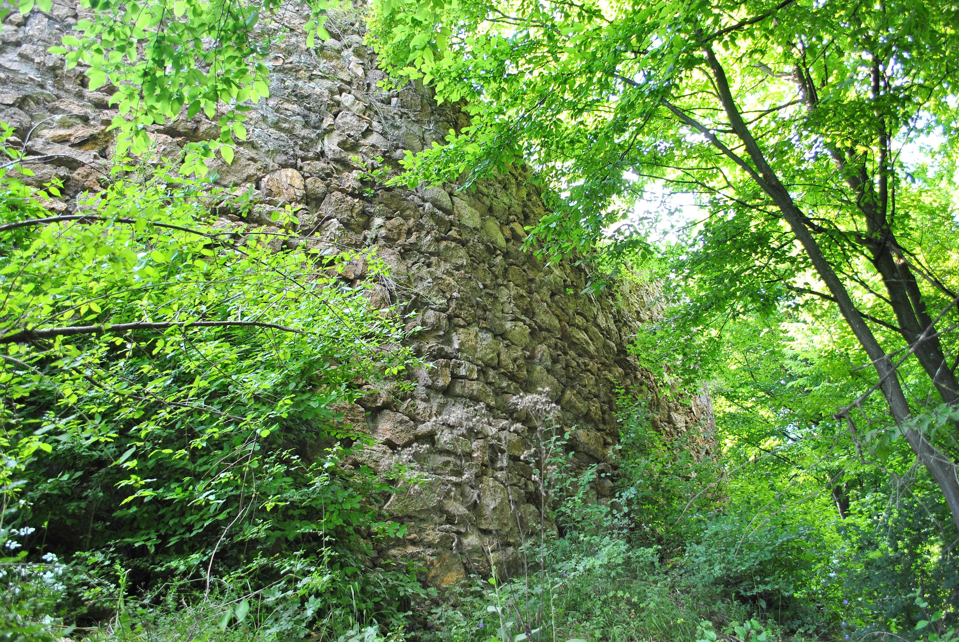 Cetatea Jdioarei